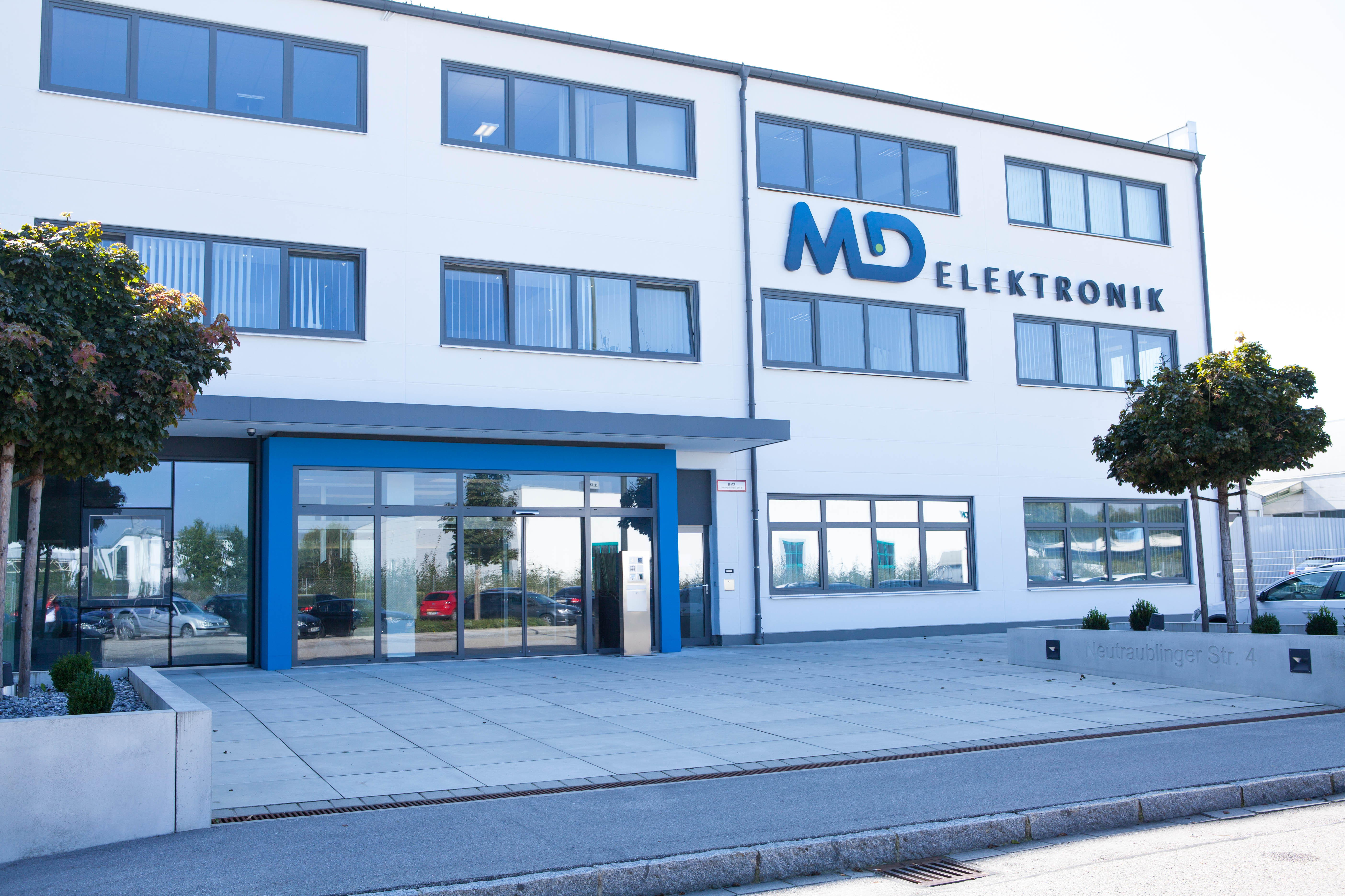 Firmenzentrale der MD Elektronik GmbH in Waldkraiburg